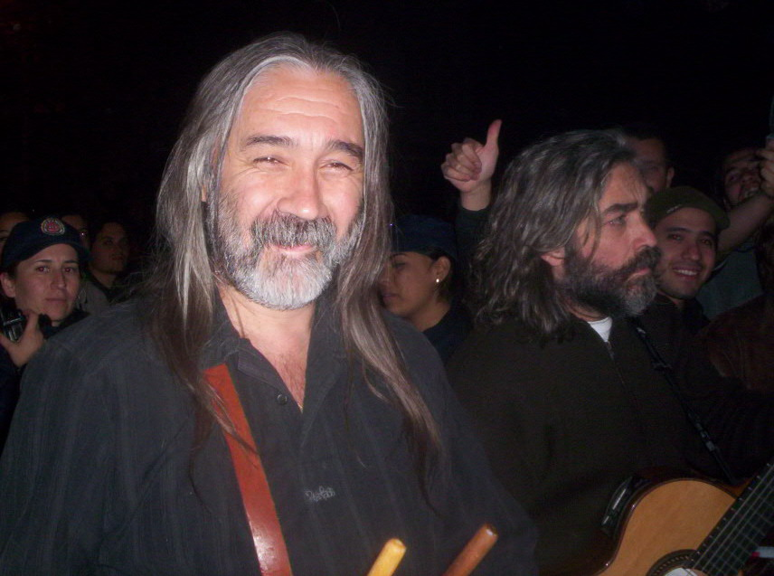 Dúo Coplanacu (Julio Paz a la izquierda y Roberto Cantos a la derecha)antes de subir al escenario en recital gratuito en la cañada de Córdoba Capital (año 2006).